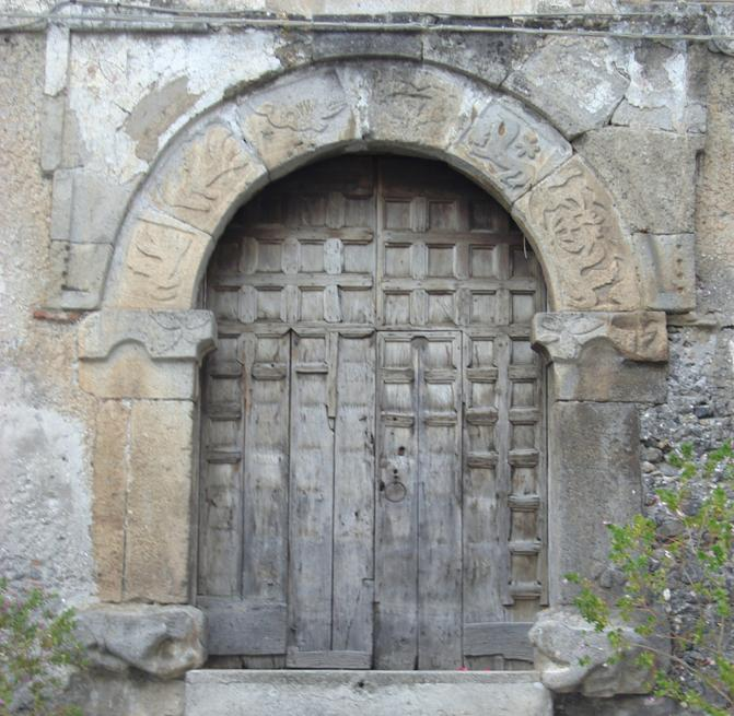 Francesco Stuppello, Tortora, Portale Litico della Chiesa delle Anime del Purgatorio